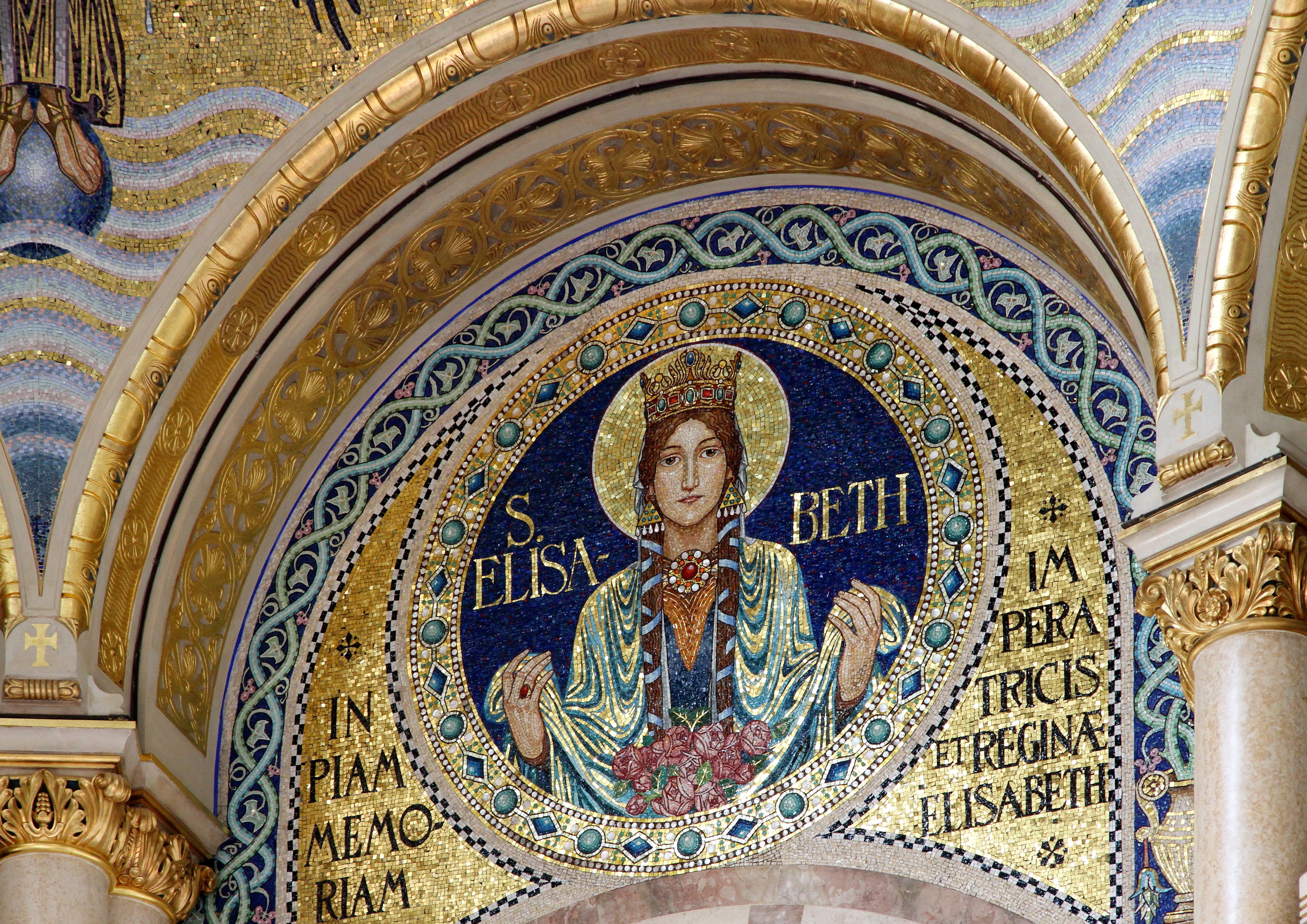 Kolossales Mosaikbildnis der Elisabeth von Thüringen in der Elisabethkapelle der Mexikokirche im 2. Wiener Gemeindebezirk Leopoldstadt. Nach einem Entwurf von Carl Ederer um 1907 ausgeführt.